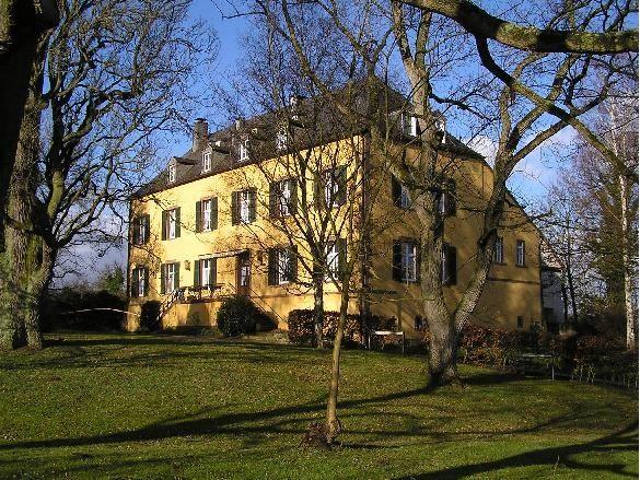 Landauer Schloß, jetzt Altenheim